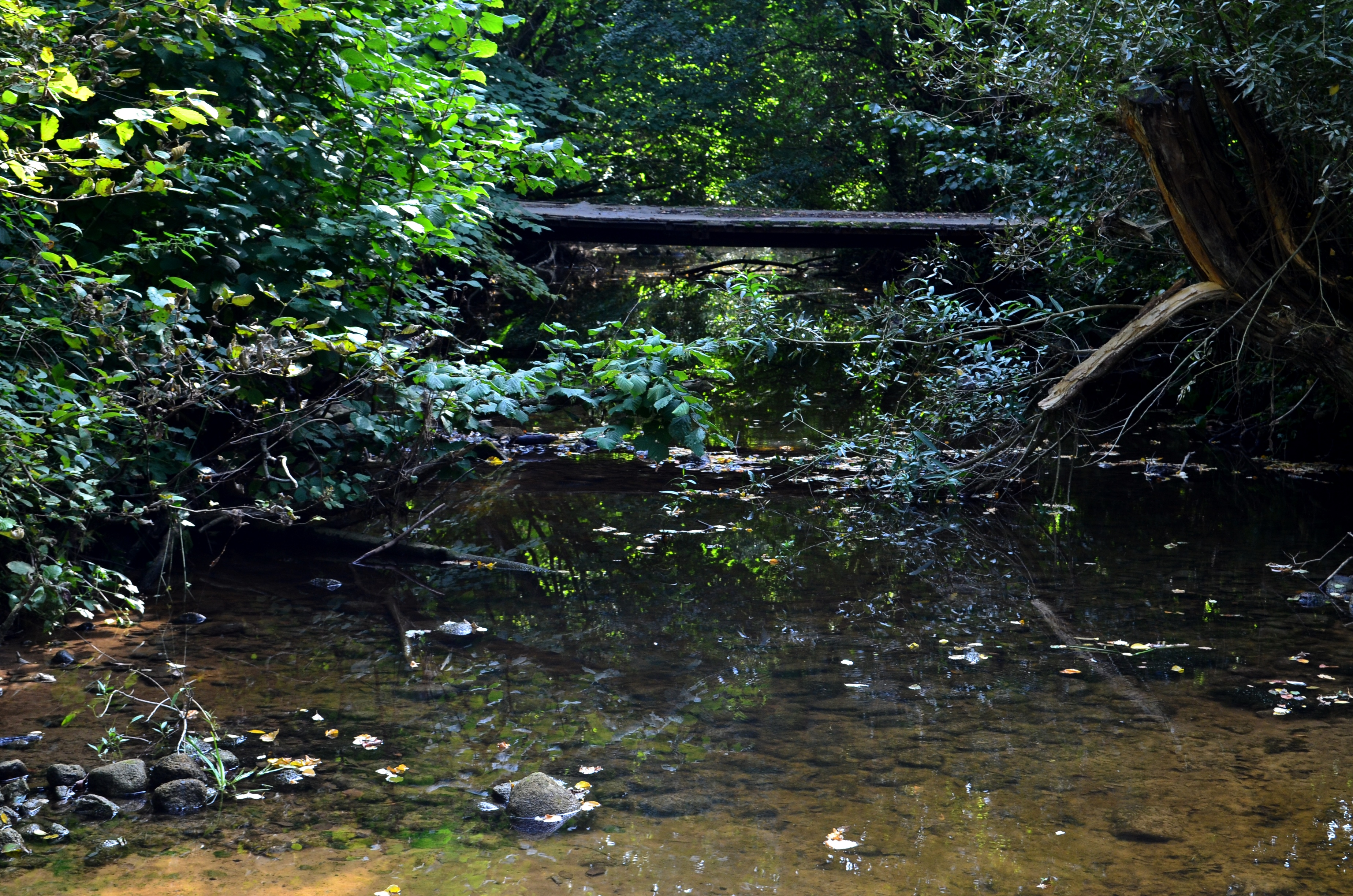 Ažytė ties Antkalniu, Krakių sen., Kėdainių raj.